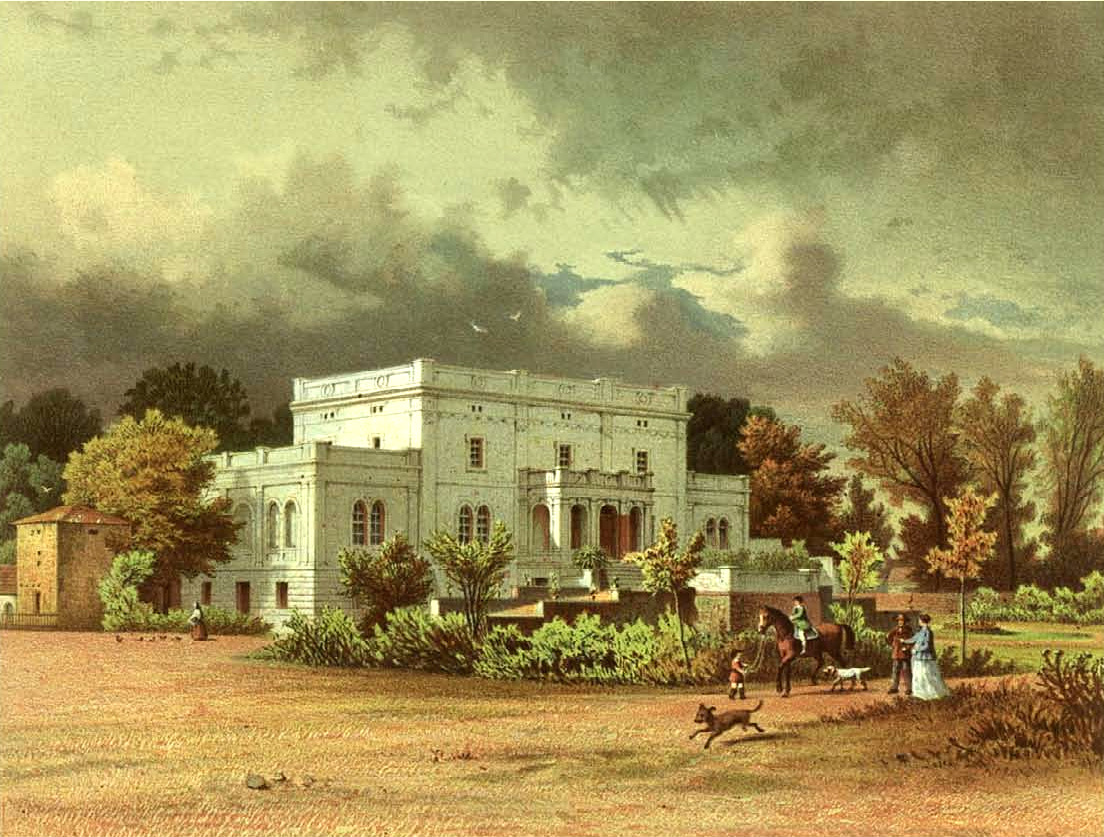 Rittergut Dittersbach, Kreis Lüben, Provinz Schlesien